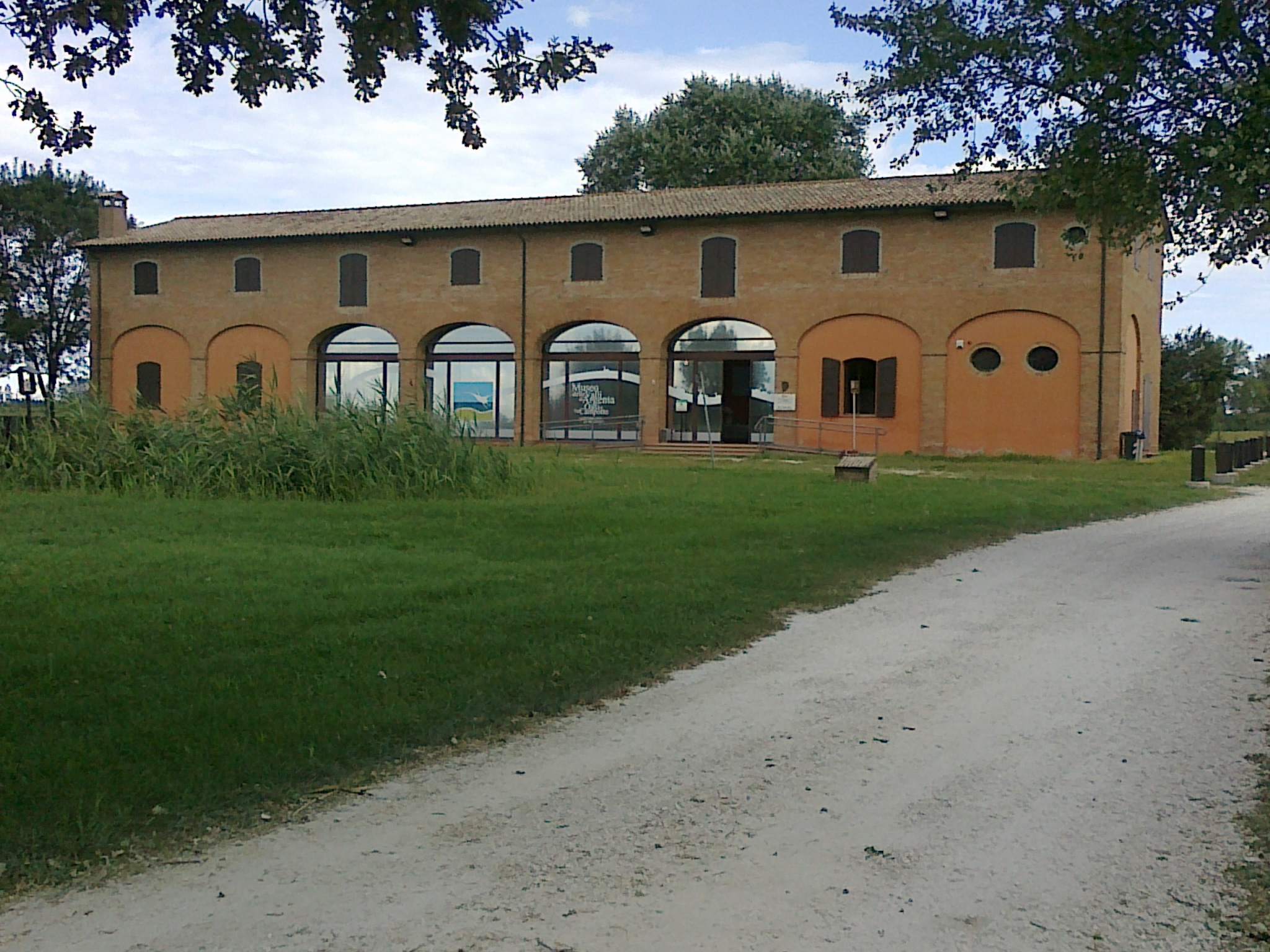 Campotto, frazione di Argenta: il Casino di Campotto, sede del Museo delle Valli di Argenta.